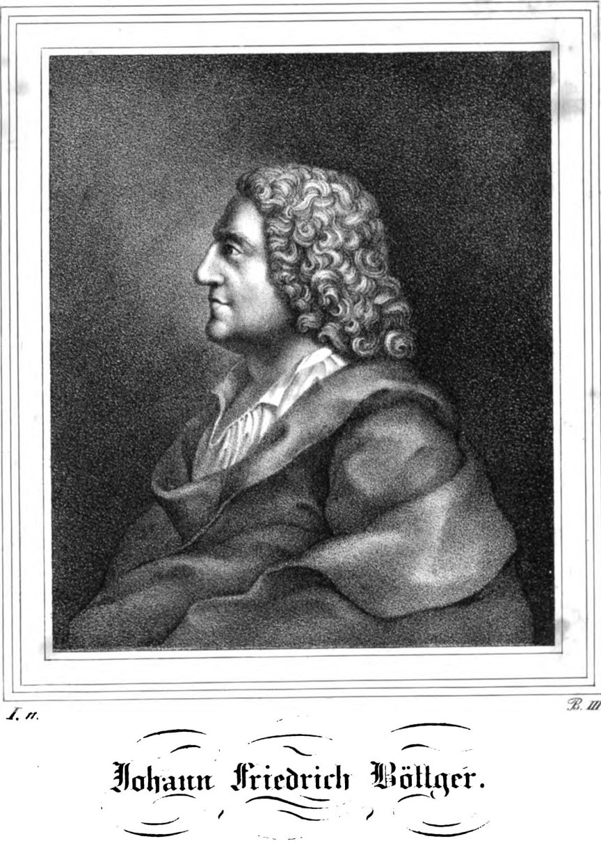 Saxonia Museum für saechsische Vaterlandskunde. Band 1. Dresden: Pietzsch und Comp. Siehe File:Saxonia Museum für saechsische Vaterlandskunde I.djvu